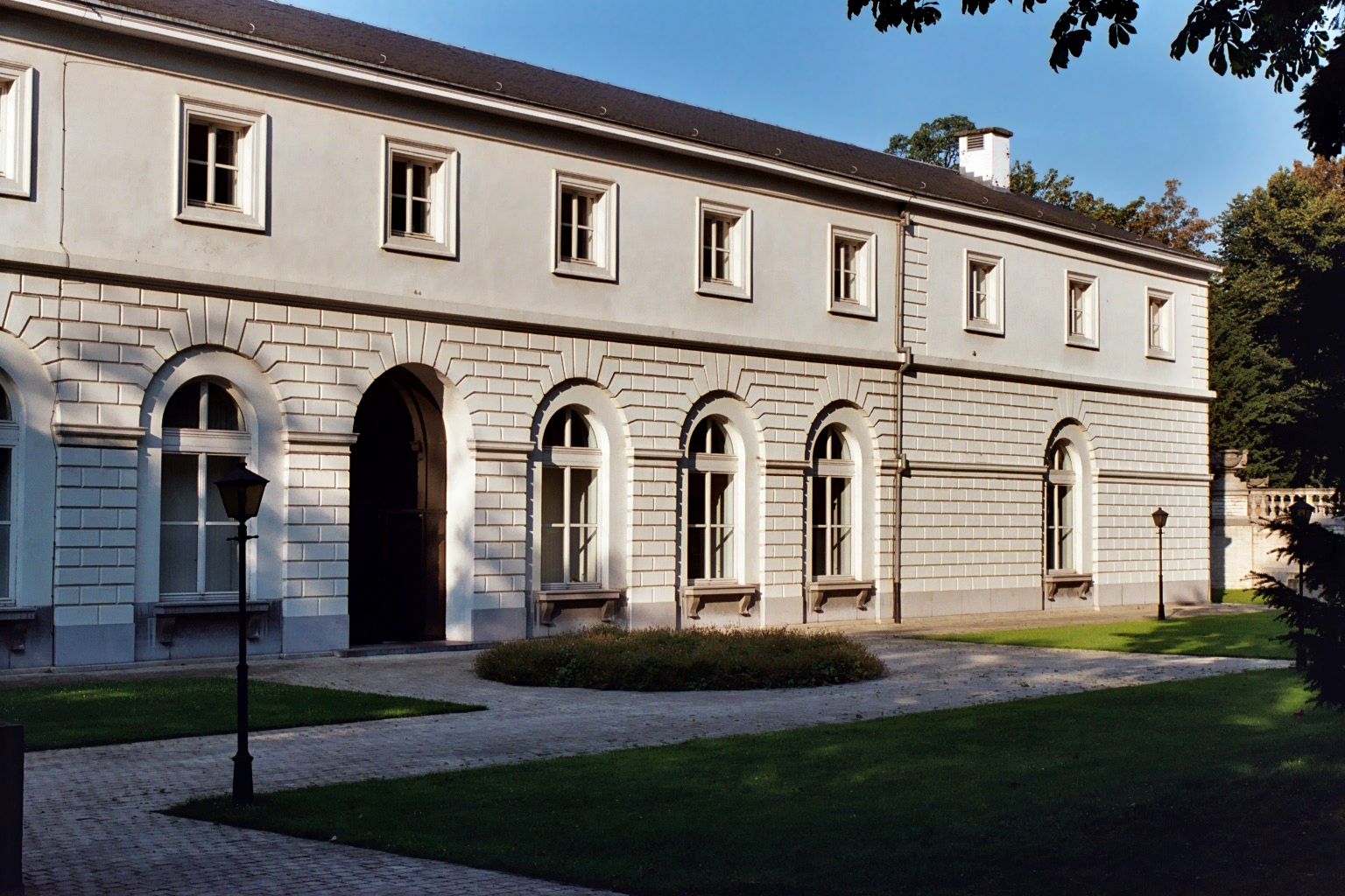 Belgique - Écuries royales de Bruxelles